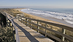 Promenade avec barrière garde-corps sur les dunes - Le Bois-Plage - Île de Ré Photo issue de ma banque d'images personnelle